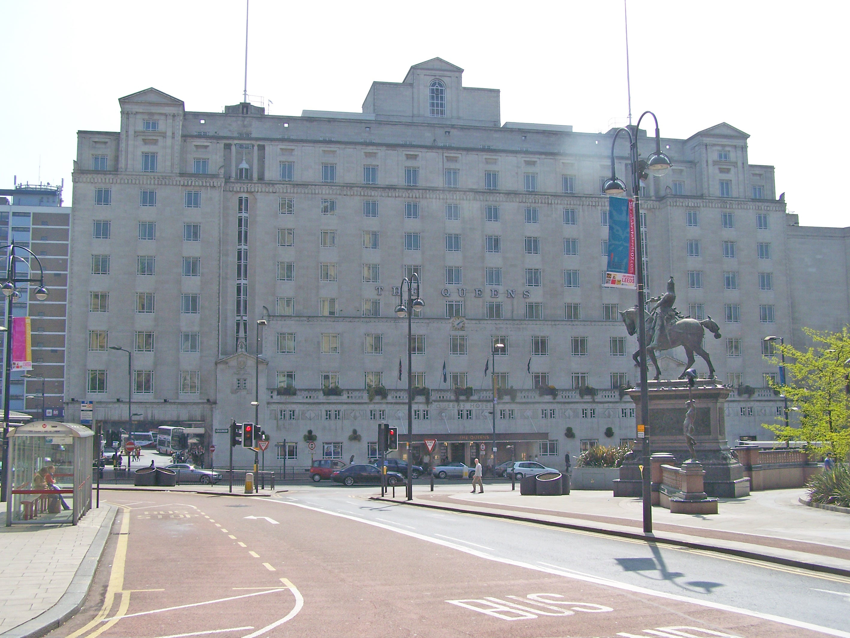 Queens Hotel